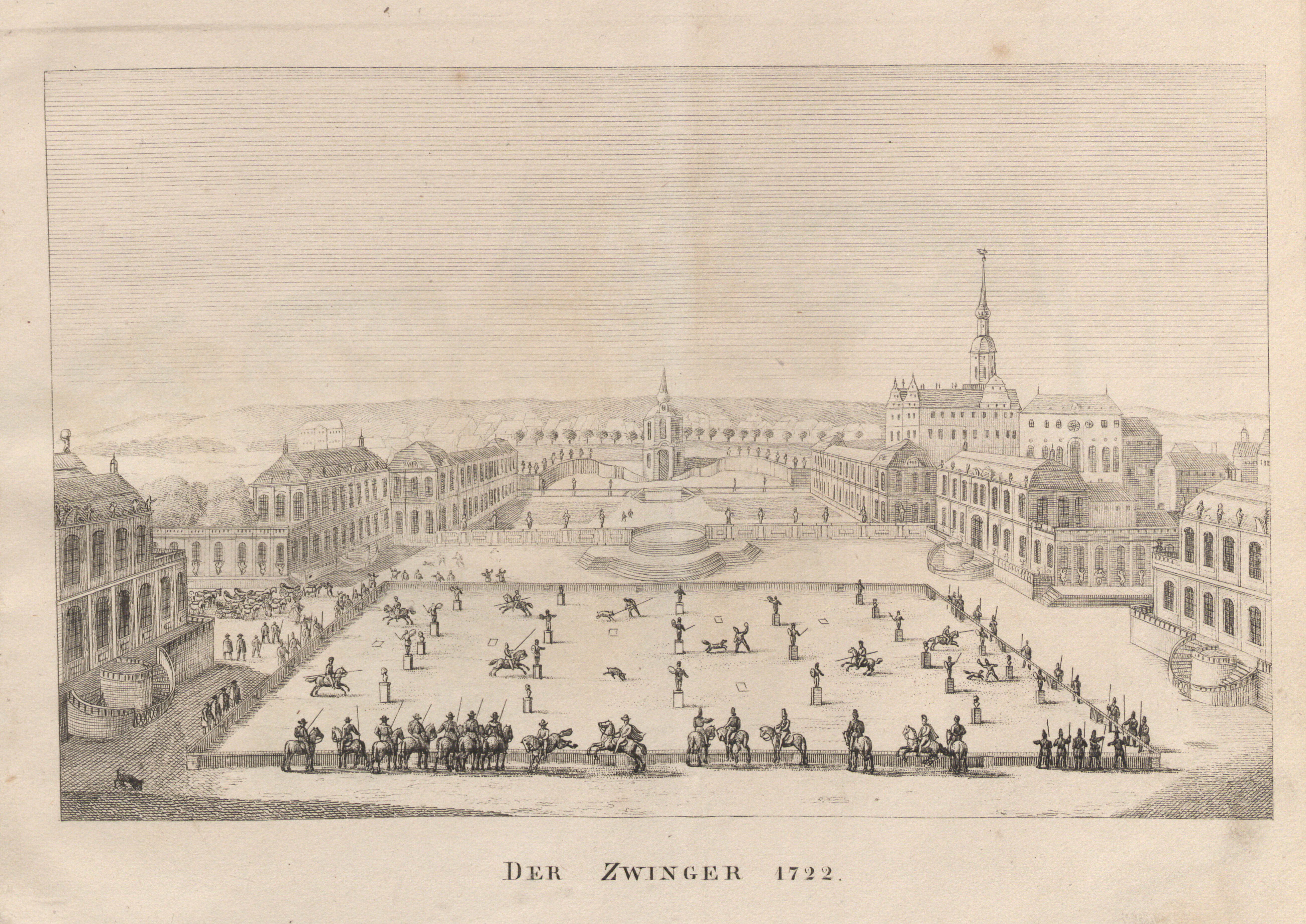 siehe Bildbeschreibung aus: Abbildungen von Dresdens alten und neuen Pracht-Gebäuden, Volks- und Hof-Festen. Untertitel: Kupferheft zur Chronik der Kgl. Sächs. Residenz-Stadt Dresden und des Sammlers für Geschichte und Alterthum, Kunst und Natur im Elbthale. Grimmer, Dresden 1835